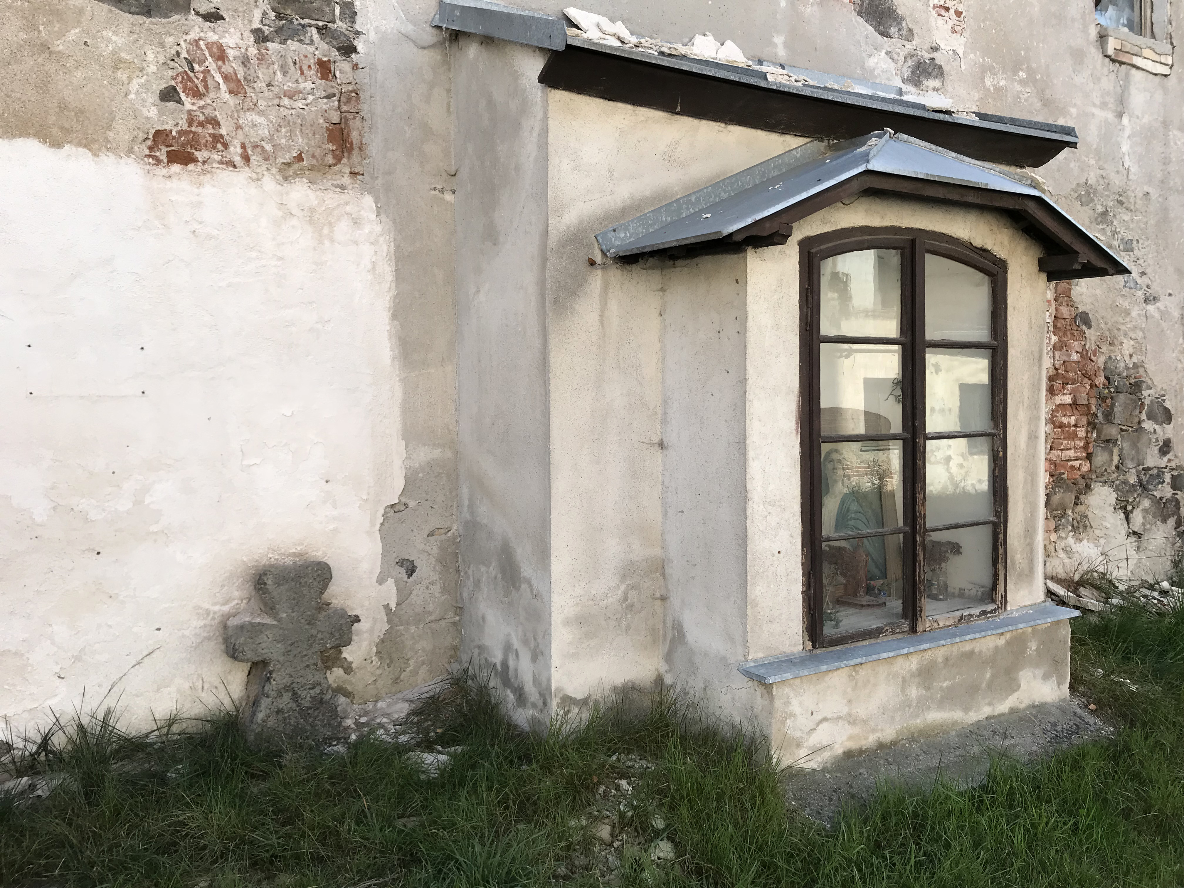 Smírčí kříž v Jakubově (Vojkovice) u zdi bývalé porcelánky